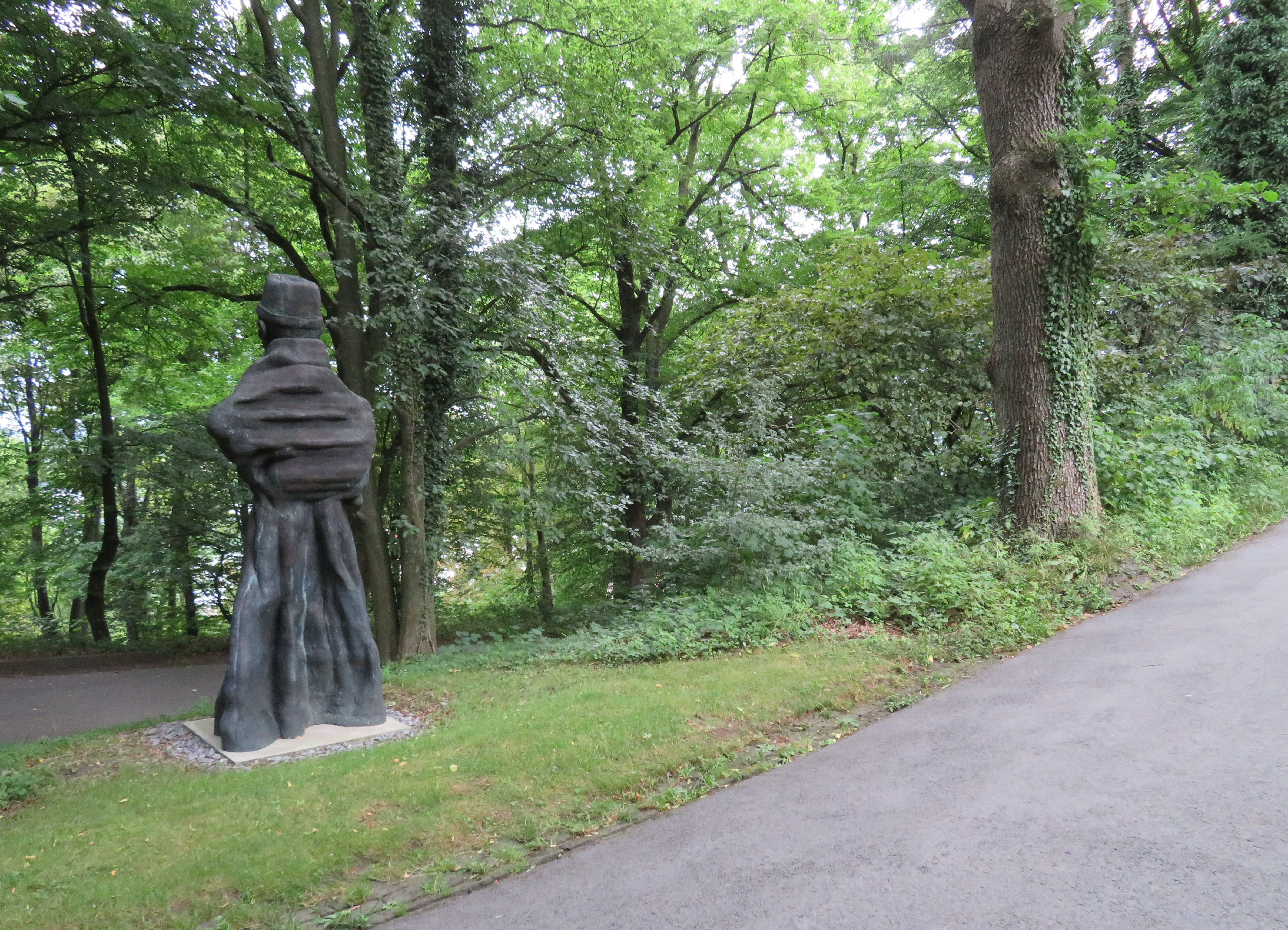 Skulpturenpark Waldfrieden Weg zum Eingang